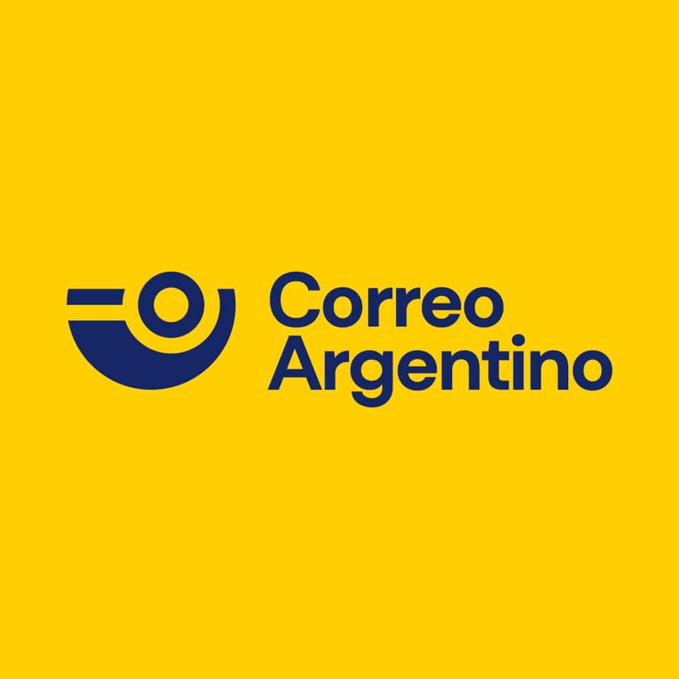 Logotipo correo oficial